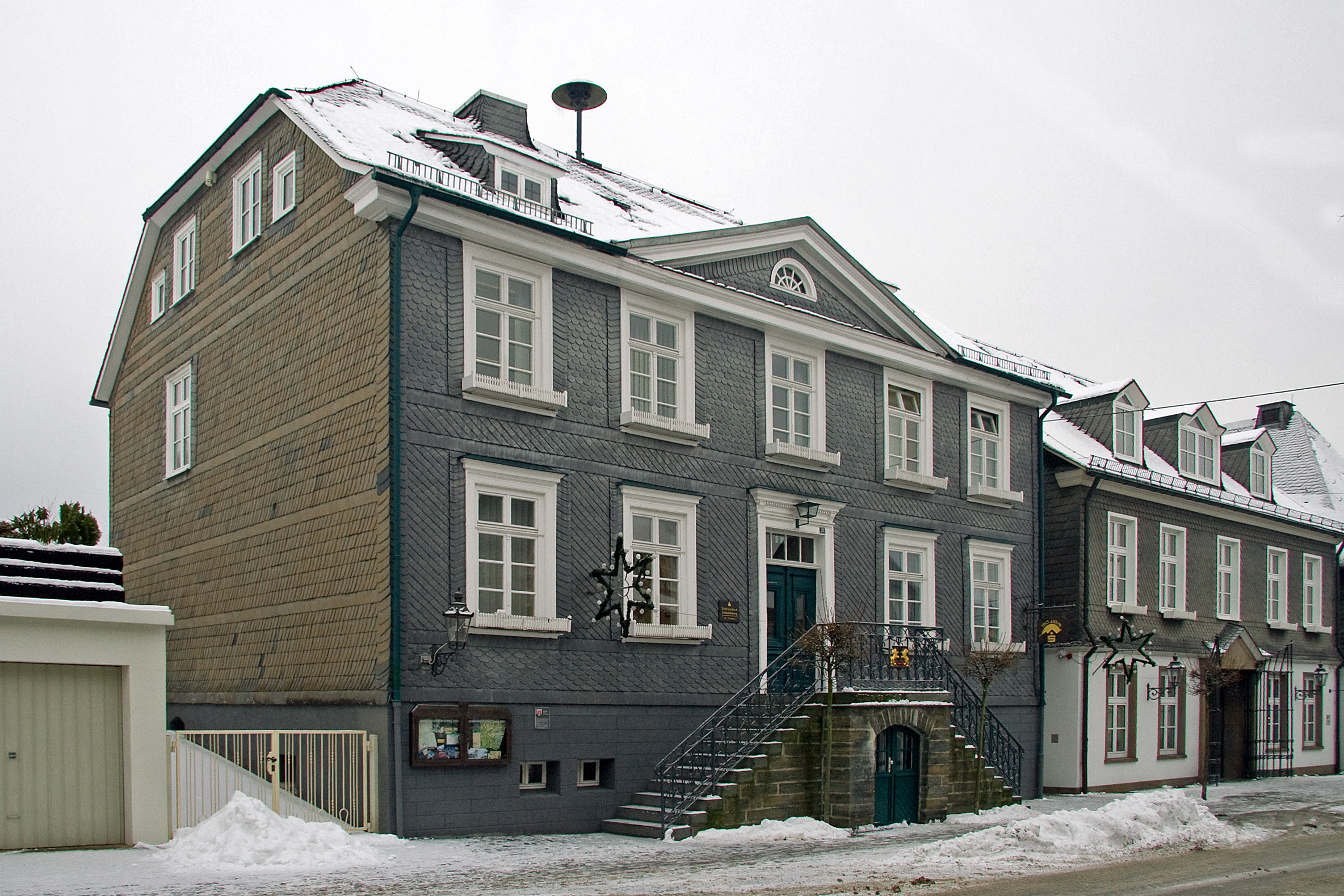 Denkmalgeschütztes Bürgerhaus in der Weststraße 32, heute Sitz der Stadtsparkasse Schmallenberg Schmallenberg